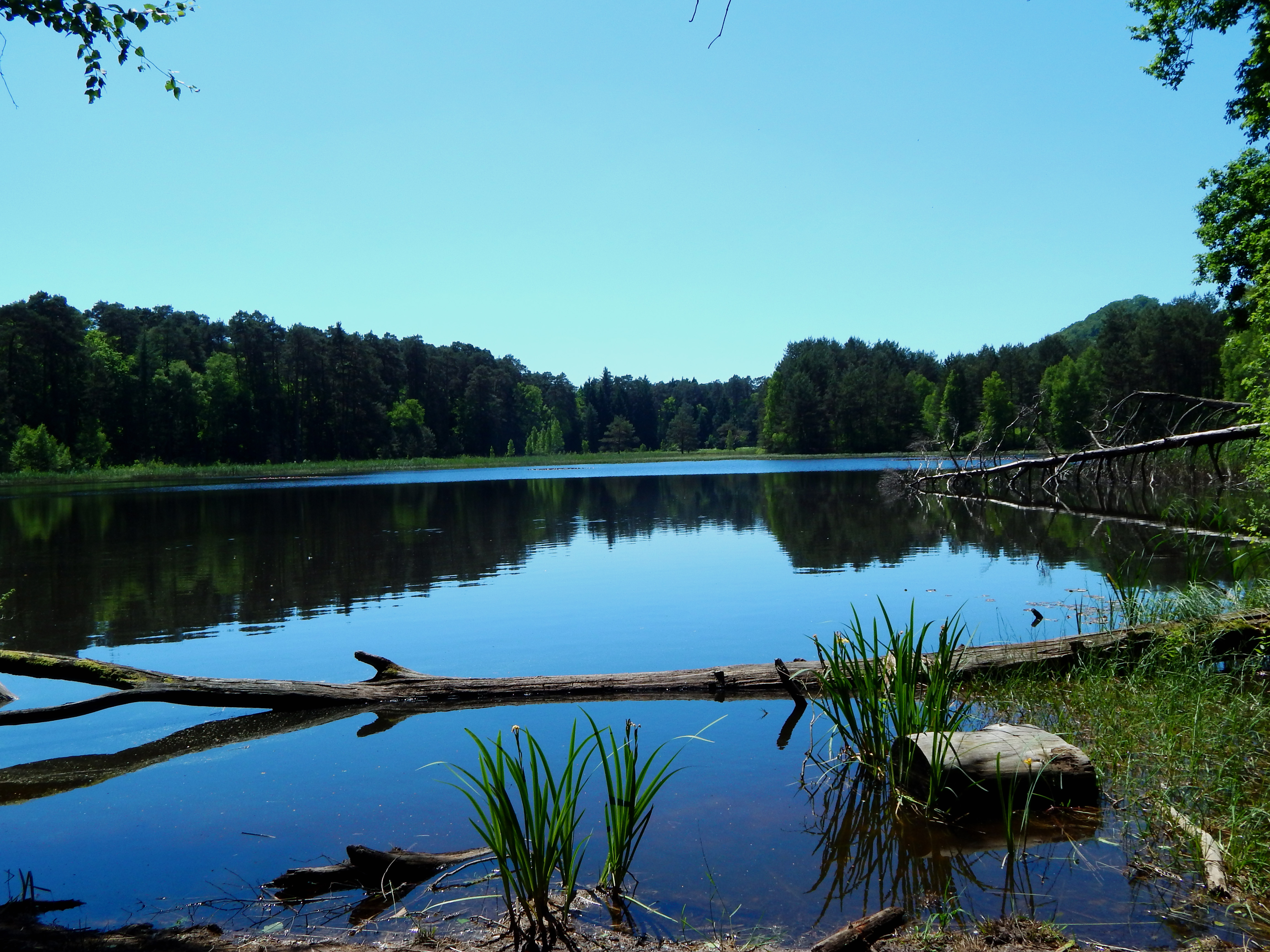 Pfalzwoog; Biosphärenreservat Pfälzerwald